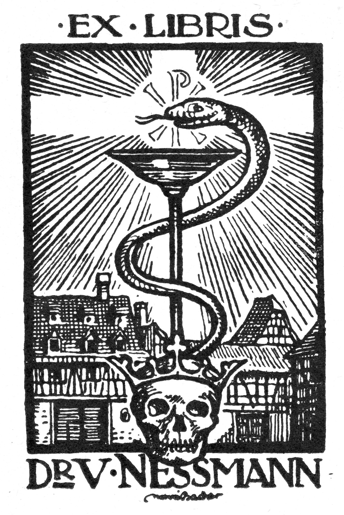 Henri Bacher: Ex libris für den Straßburger Arzt und späteren Widerstandskämpfer Victor Nessmann